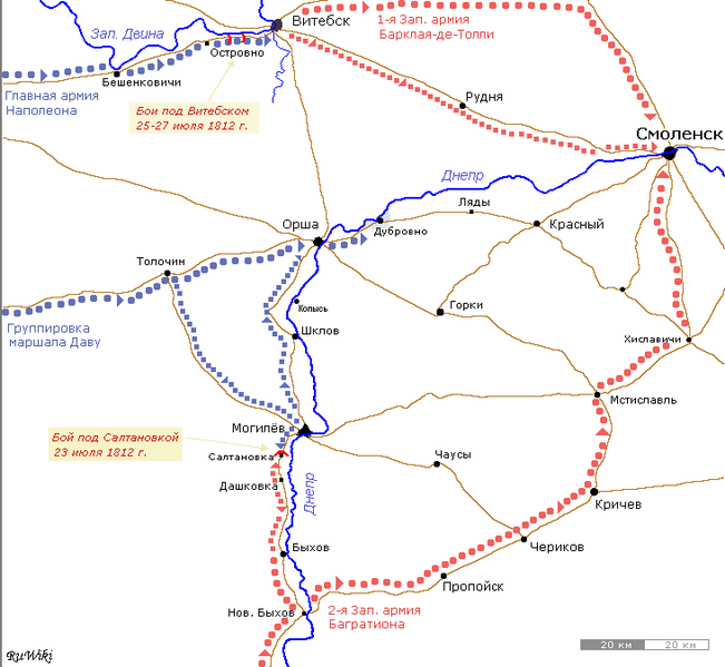 Схема злучэнняў рускай арміі пад Смаленкам, вайна 1812 года